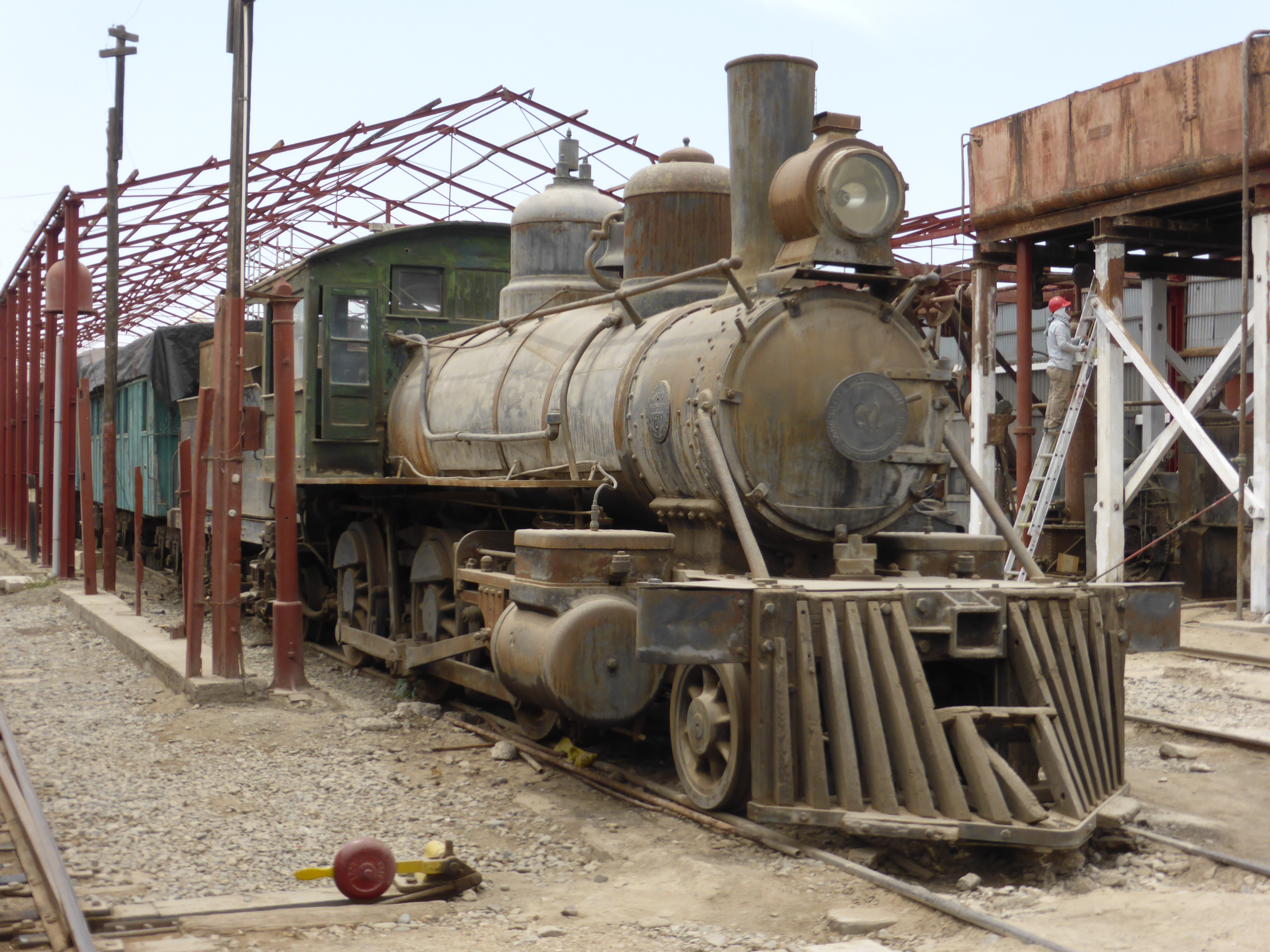 Locomotora de vapor con placa de fabricación: "Baldwin Locomotive Works. Burnham, Williams & Co. 32983. October 1908. Philadelphia U. S. A." Es de rodaje 130 (2-6-0 en terminología británica y norteamericana), con un eje libre delantero y tres ejes acoplados. El museo ("Museo Ferroviario Nacional de Tacna") está en restauración en el año 2018. A la derecha se ve que están pintando el depósito de agua.